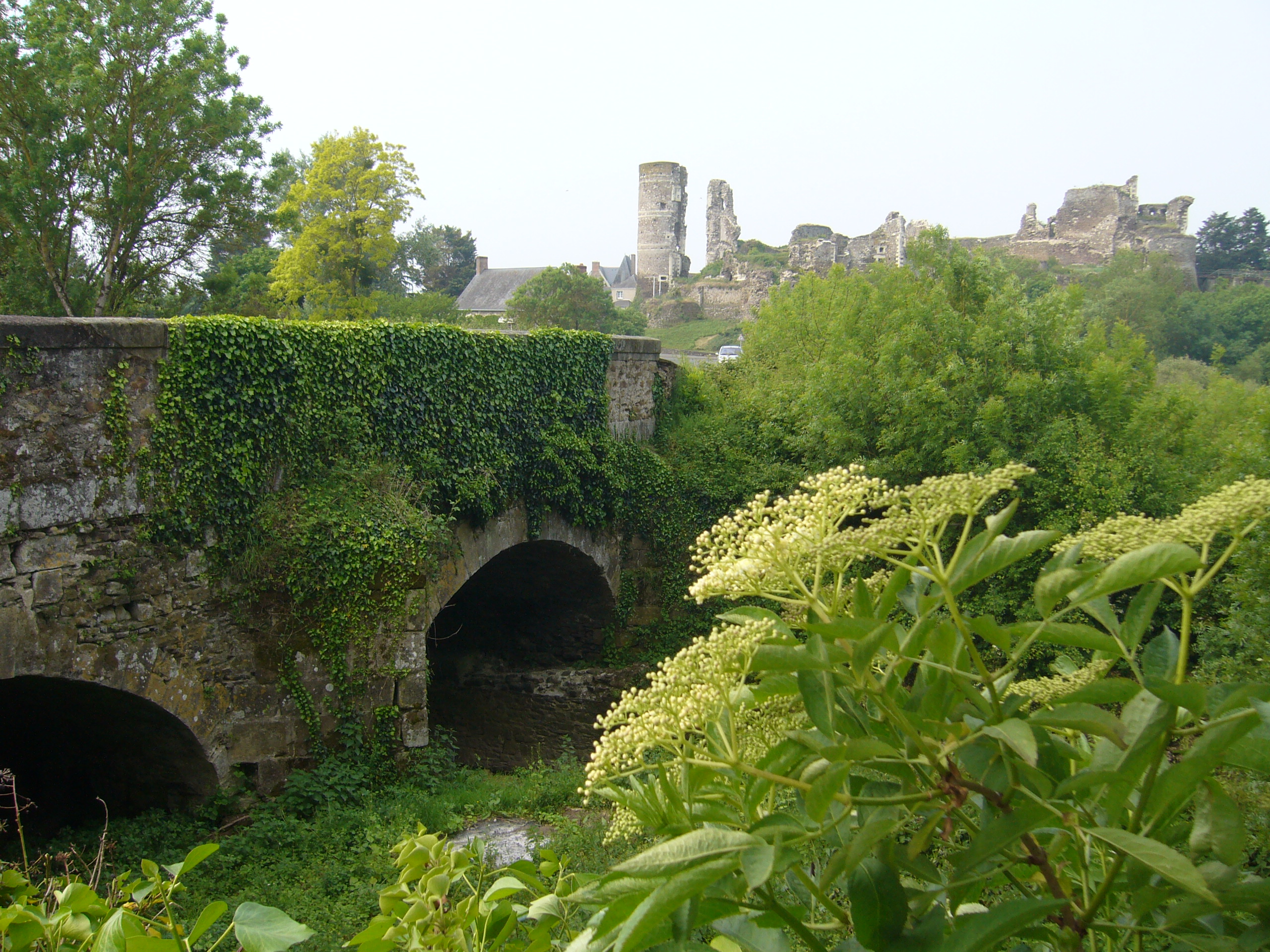 Pont enjambant la rivière Romme devant le château de Champtocé en Anjou.